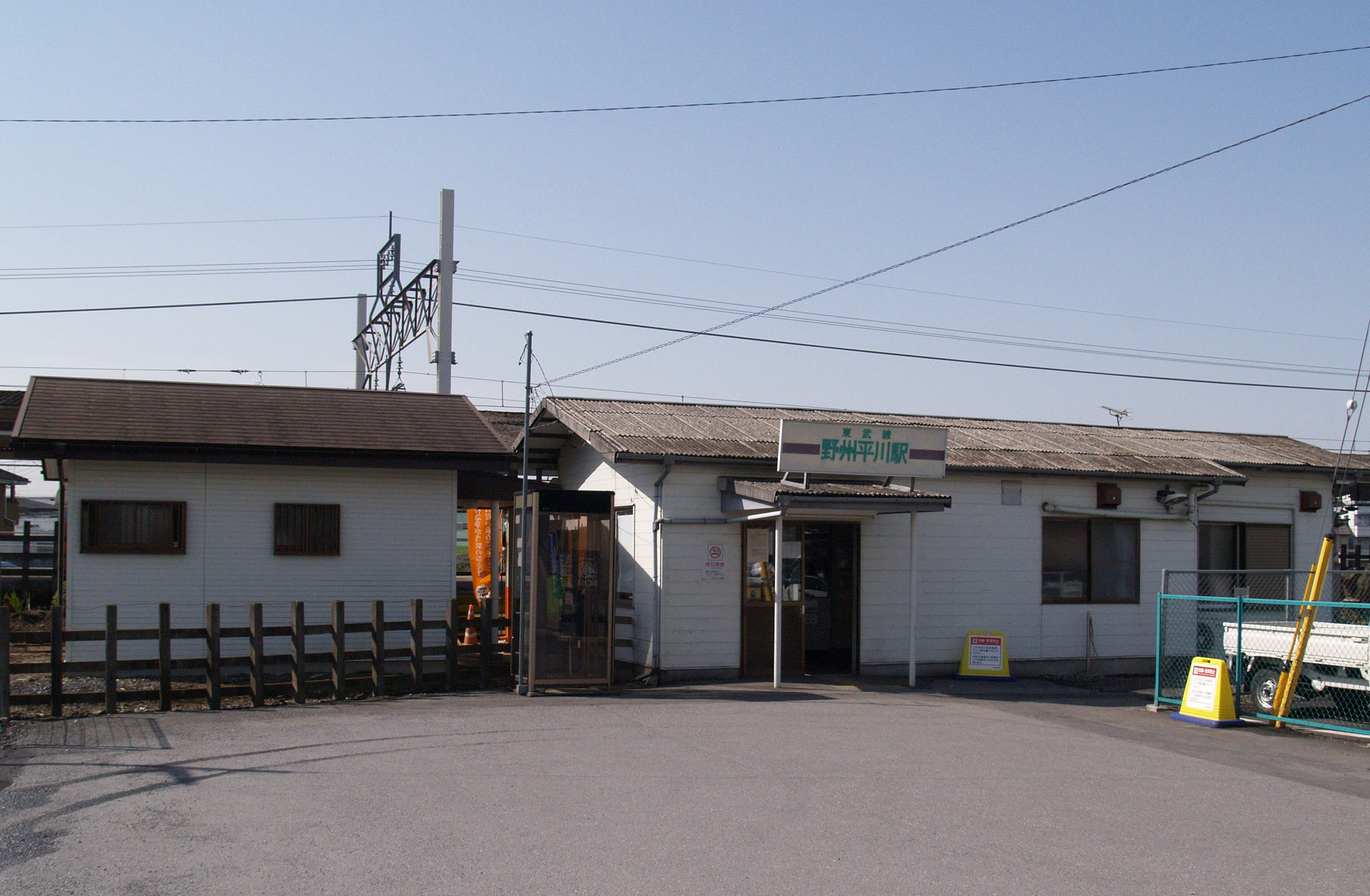 野州平川駅駅舎